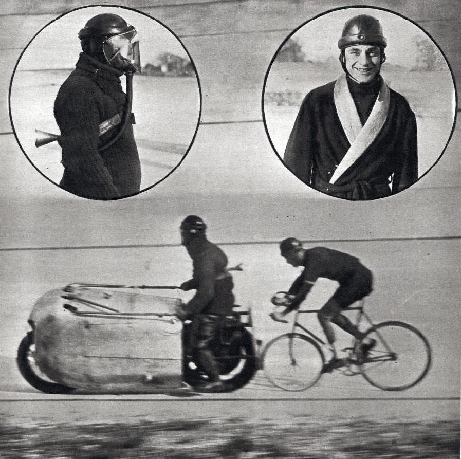 1er novembre 1925, le cycliste Jean Brunier atteint 120,958 km en 1 heure sur l'autodrome de Linas-Montlhéry, derrière moto (WR sur terrain plat et derrière abri; entraîneur Lauthier, à G.).